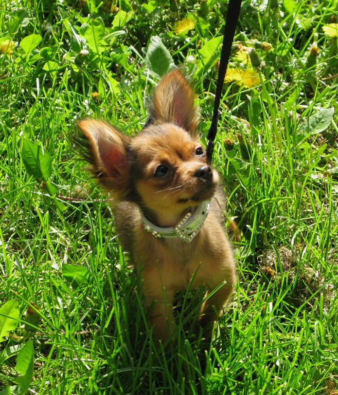 3,5 Monate alter Russkiy Toy, langhaar